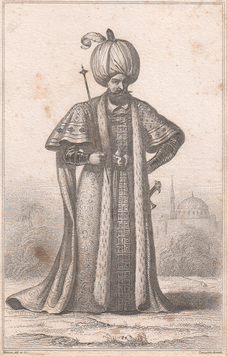 "Sultan Suleïman le Législateur". Illustration de "Turquie" par Jouannin, 1840